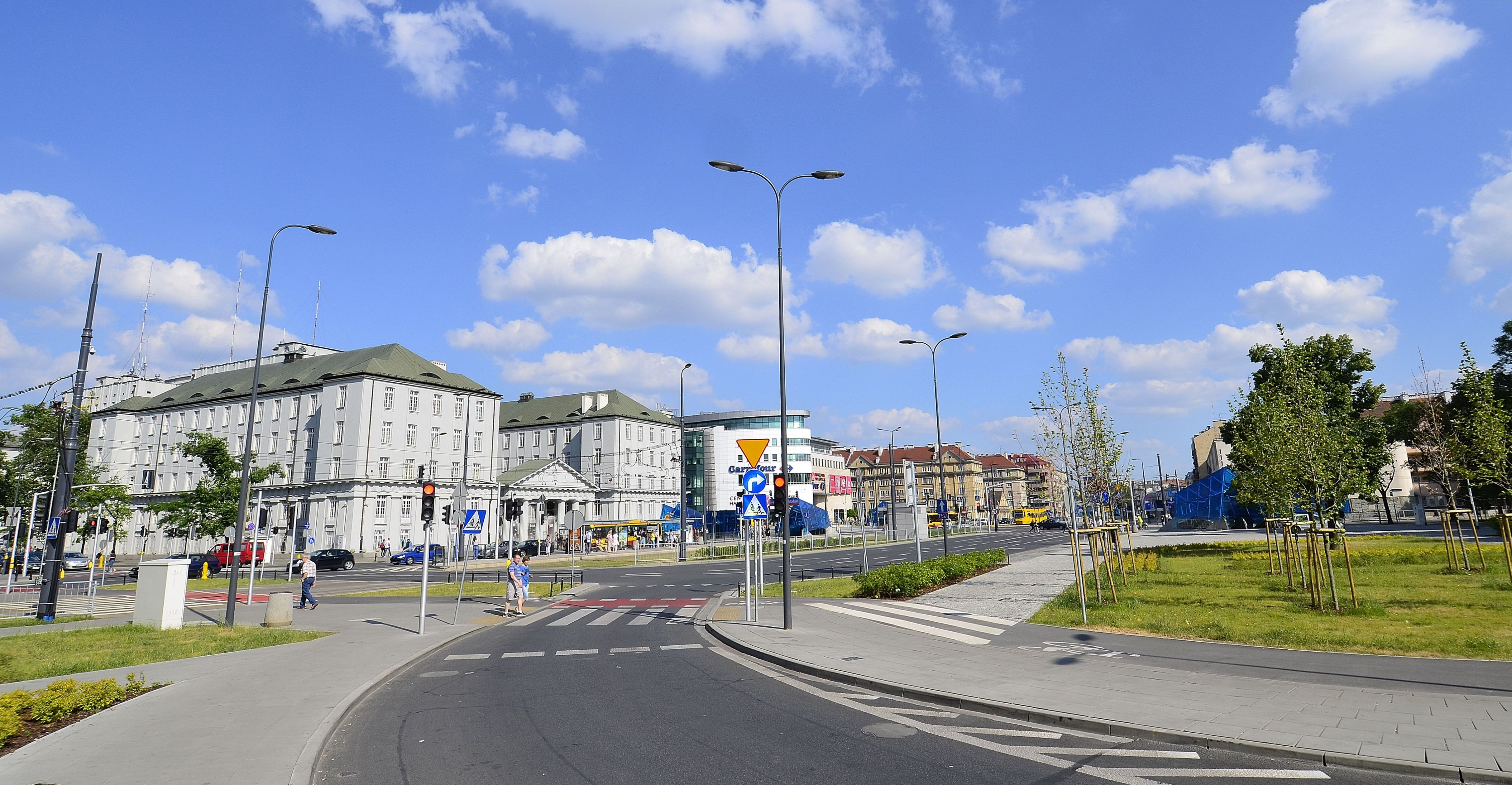 Plac Wileński w Warszawie widziany z ulicy Świętych Cyryla i Metodego